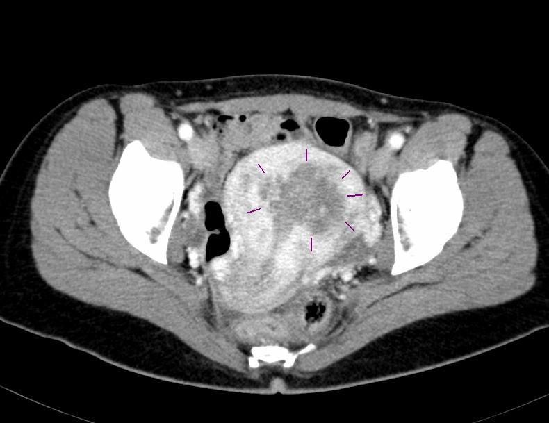 Karzinom des Corpus uteri, histologisch gesichert. Transversale 5/5 mm MSCT mit KM